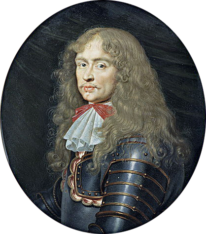 Беларуская (тарашкевіца): Партрэт Багуслава Радзівіла (Bahusłaŭ Radzivił)